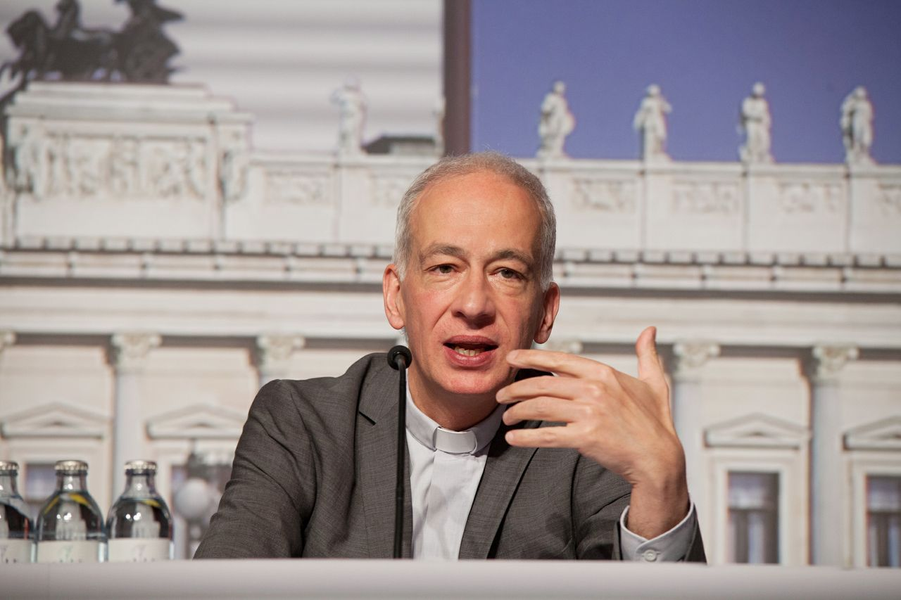 Michael Landau (Caritas Wien) auf der SPÖ Klub Frühjahrstagung 2013